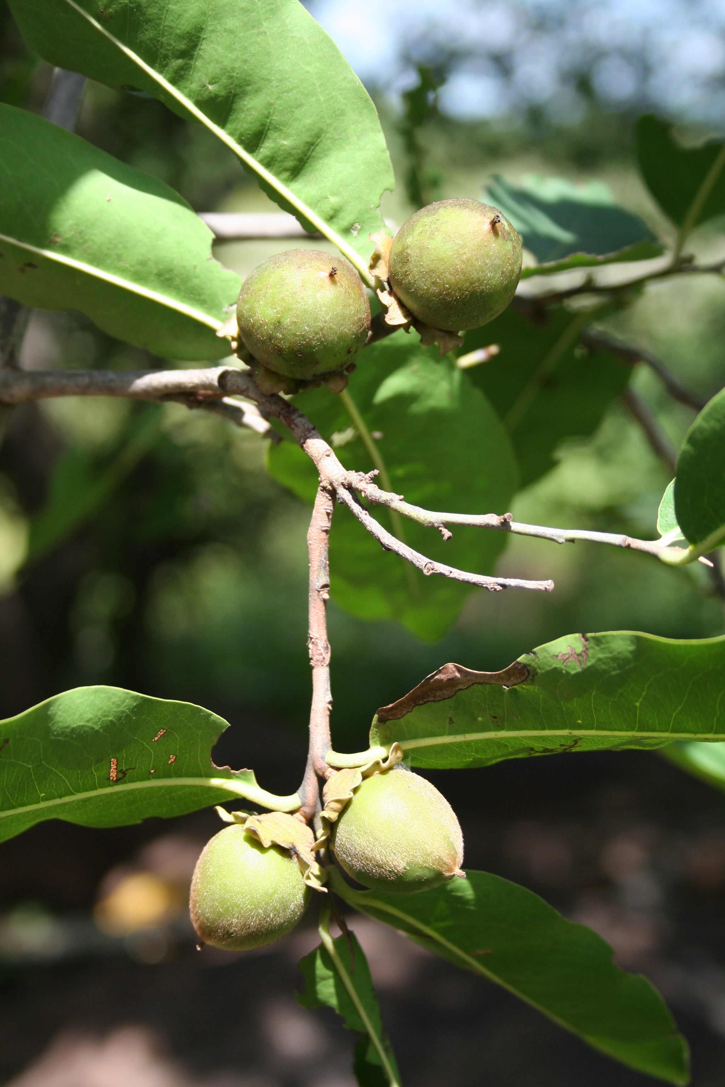 Diospyros mespiliformis, fruits, SW Burkina Faso